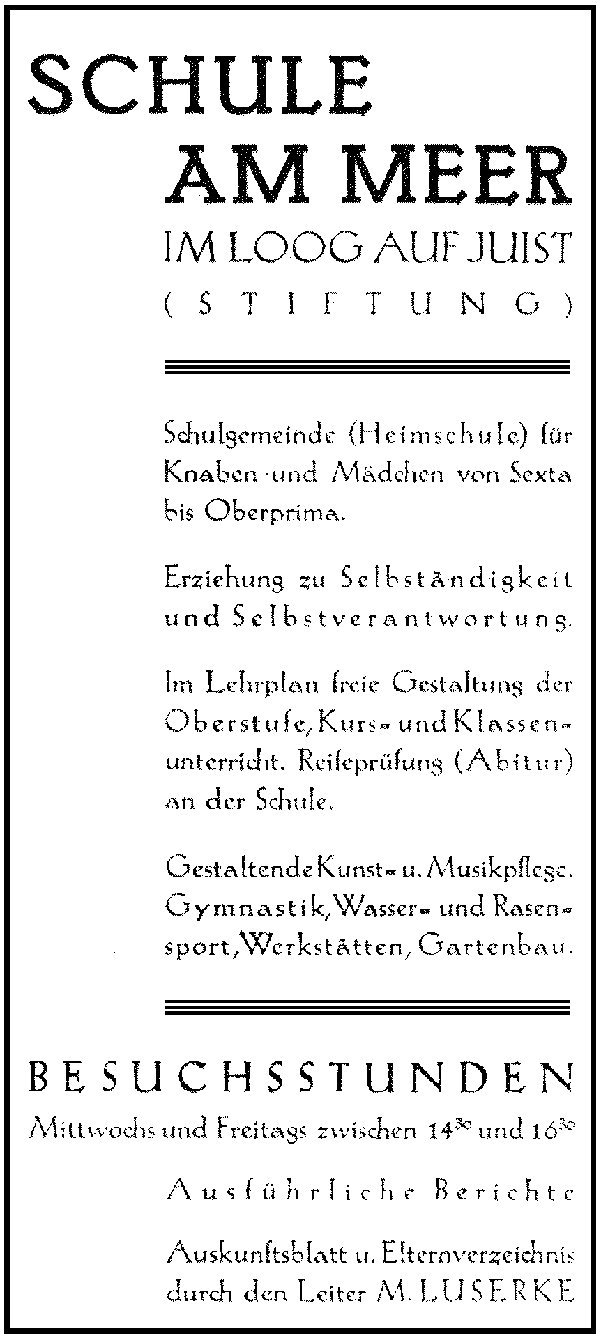 Zeitungsinserat, mit der das Landerziehungsheim Schule am Meer auf der Nordseeinsel Juist (Ostfriesland) ab 1925 in Deutschland um Privatschüler geworben hat. Es beschreibt den Schultyp, den Schulabschluss und die von staatlichen Schulen abweichenden Features: die Koedukation und die Schwerpunkte Kunst/Musik, Sport, handwerklich-praktische Ausbildung